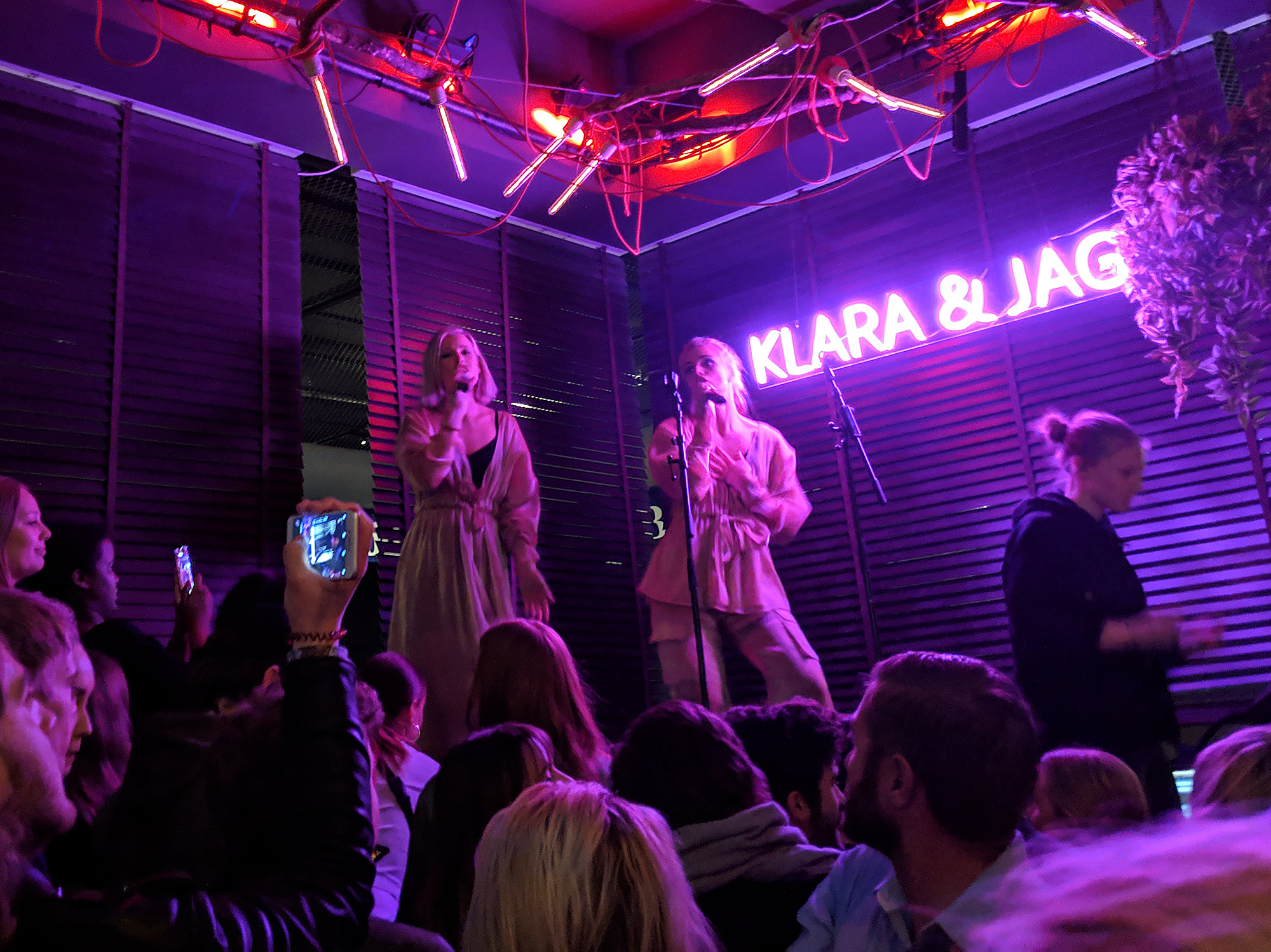 Klara & Jag live på Boqueria i Stockholm, April 2019.